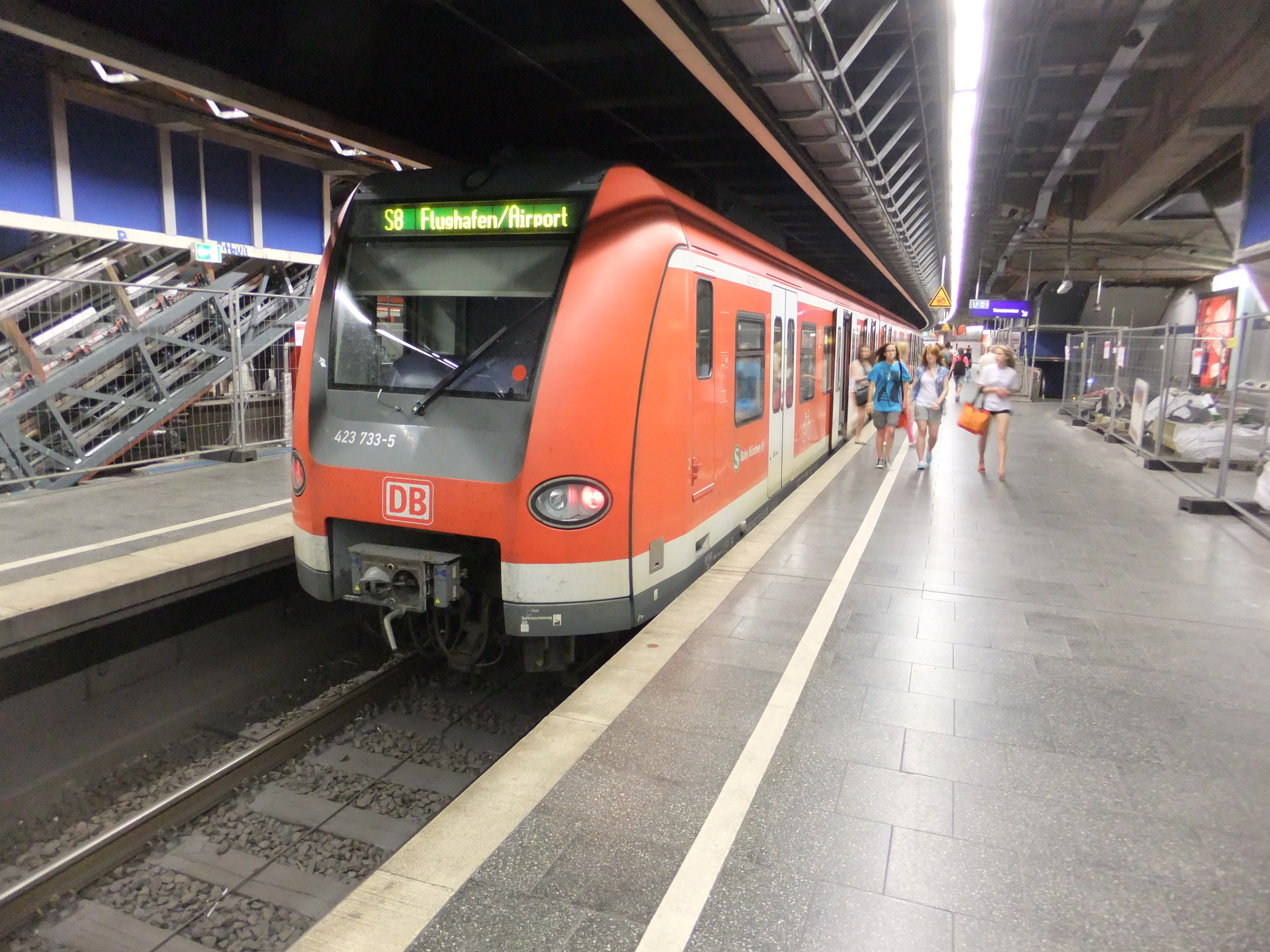 DBAG-Baureihe 423 der S-Bahn München auf der Linie S8 im Bahnhof München Karlsplatz